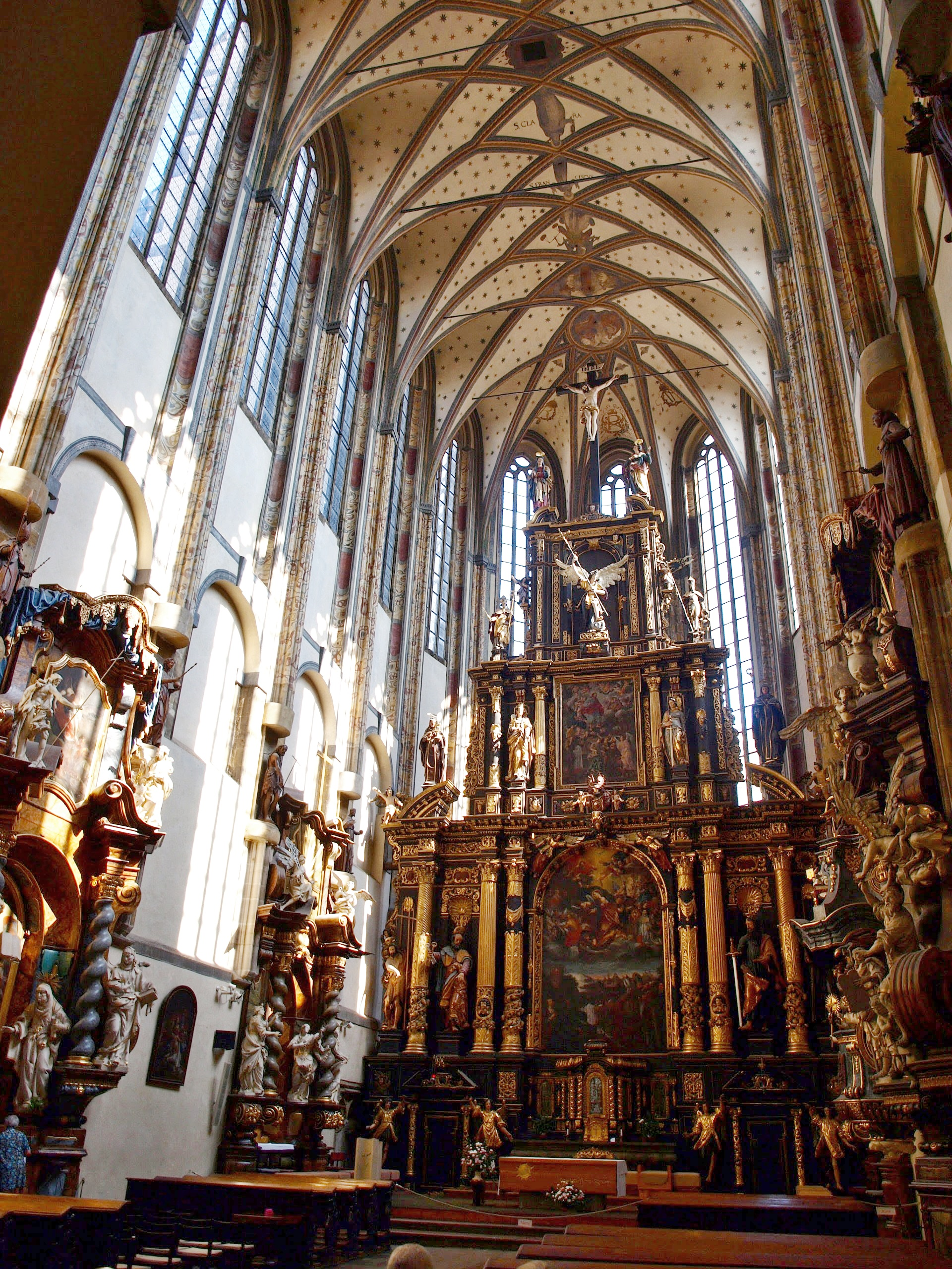 Interiér kostela Panny Marie Sněžné, Praha